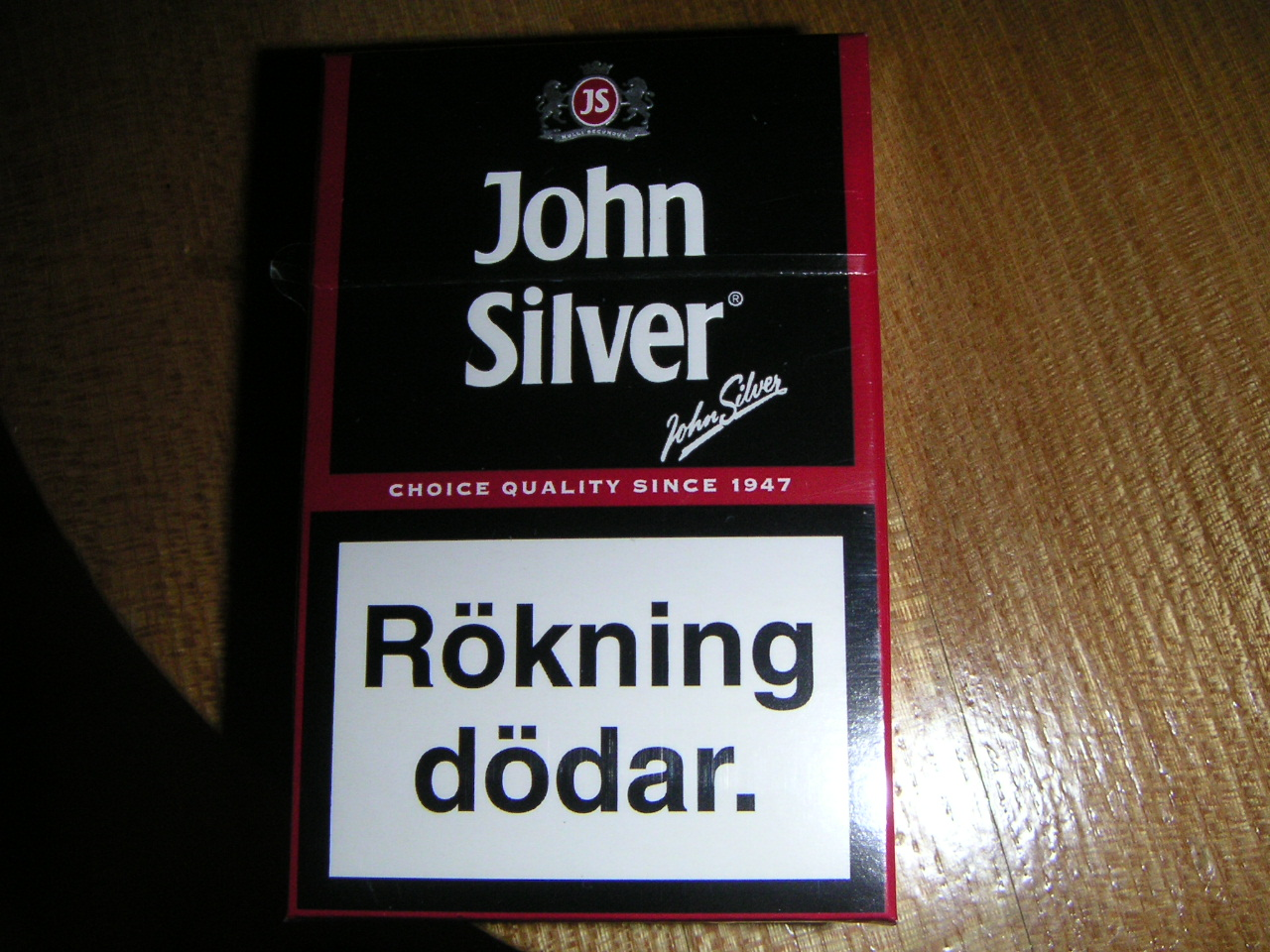 John Silver Cigarettes